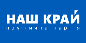 "Наш край"